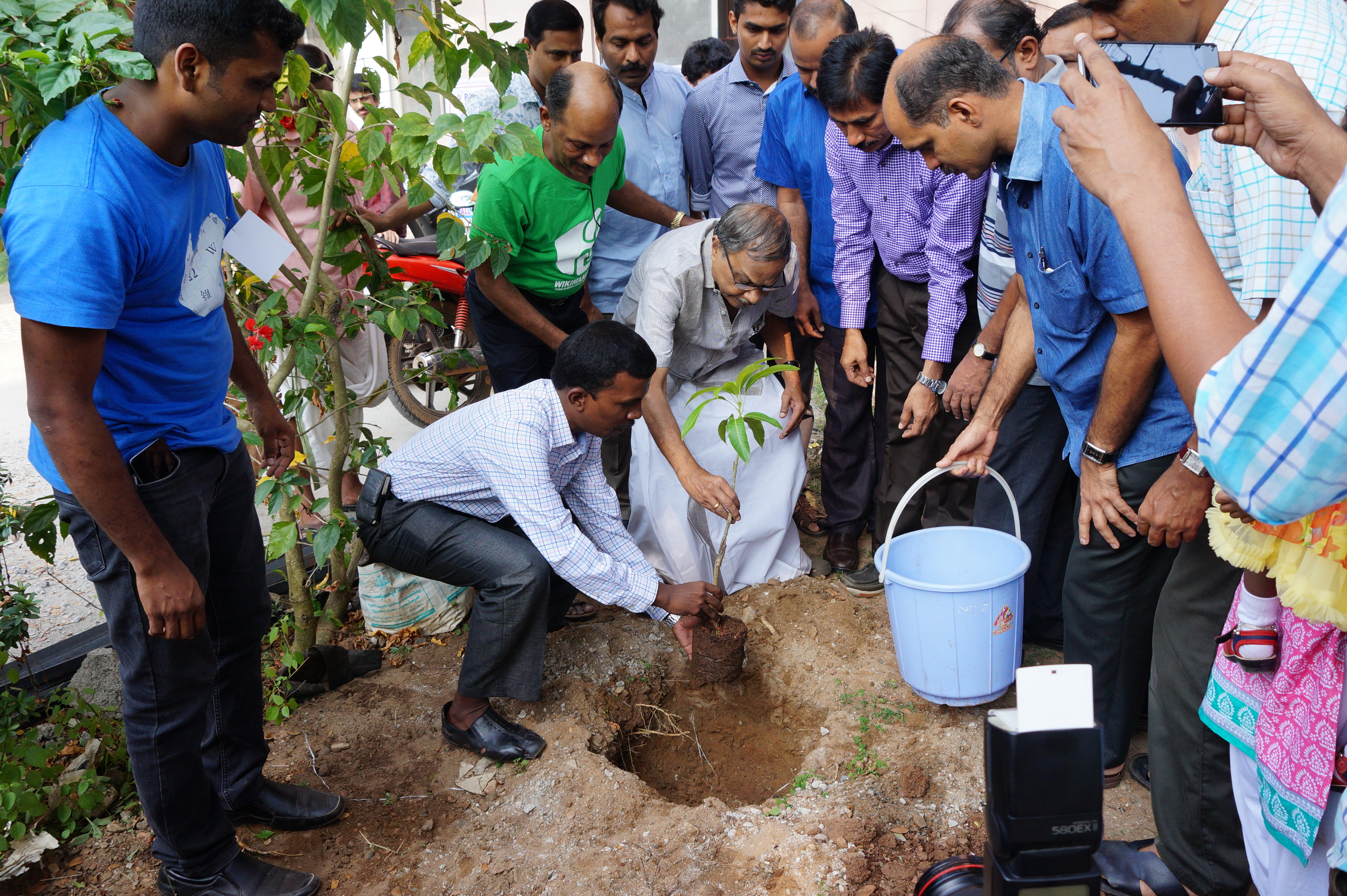 എം ടി വാസുദേവന്‍ നായര്‍ മാവ് നട്ടുകൊണ്ട് ഉത്ഘാടനം നിര്‍വ്വഹിക്കുന്നു.